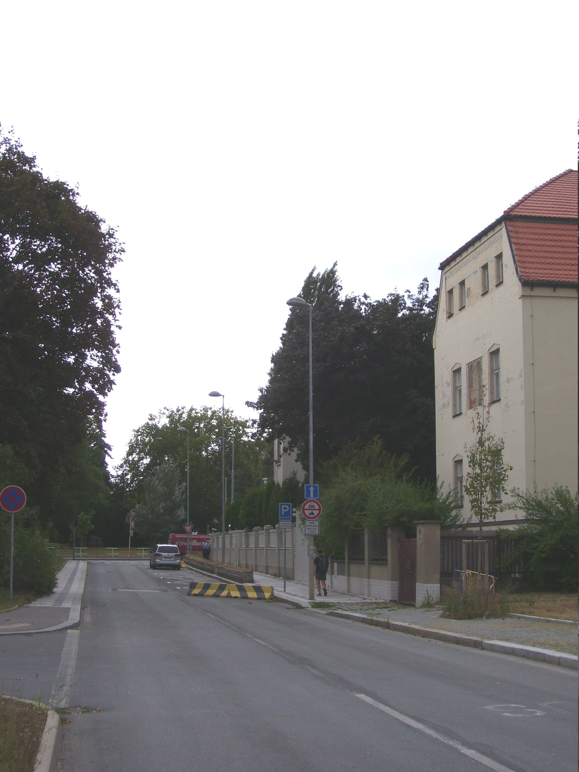 Ulice Na Špejcharu (Praha), pohled od Letenských sadů směrem k ulici Badeniho. Zřetelná budova vpravo je Wilfertova vila neboli Modrý dům, Na Špejcharu 291/3, kde sídlí Obec křesťanů v České republice a Galerie Josefa Adamce. Méně zřetelná je další budova, Na Špejcharu 491/1, kde sídlí velvyslanectví Izraele.